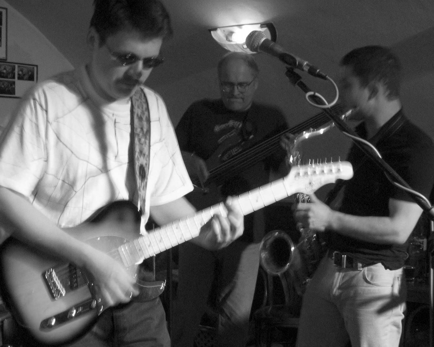 Klub Bigbít 2006